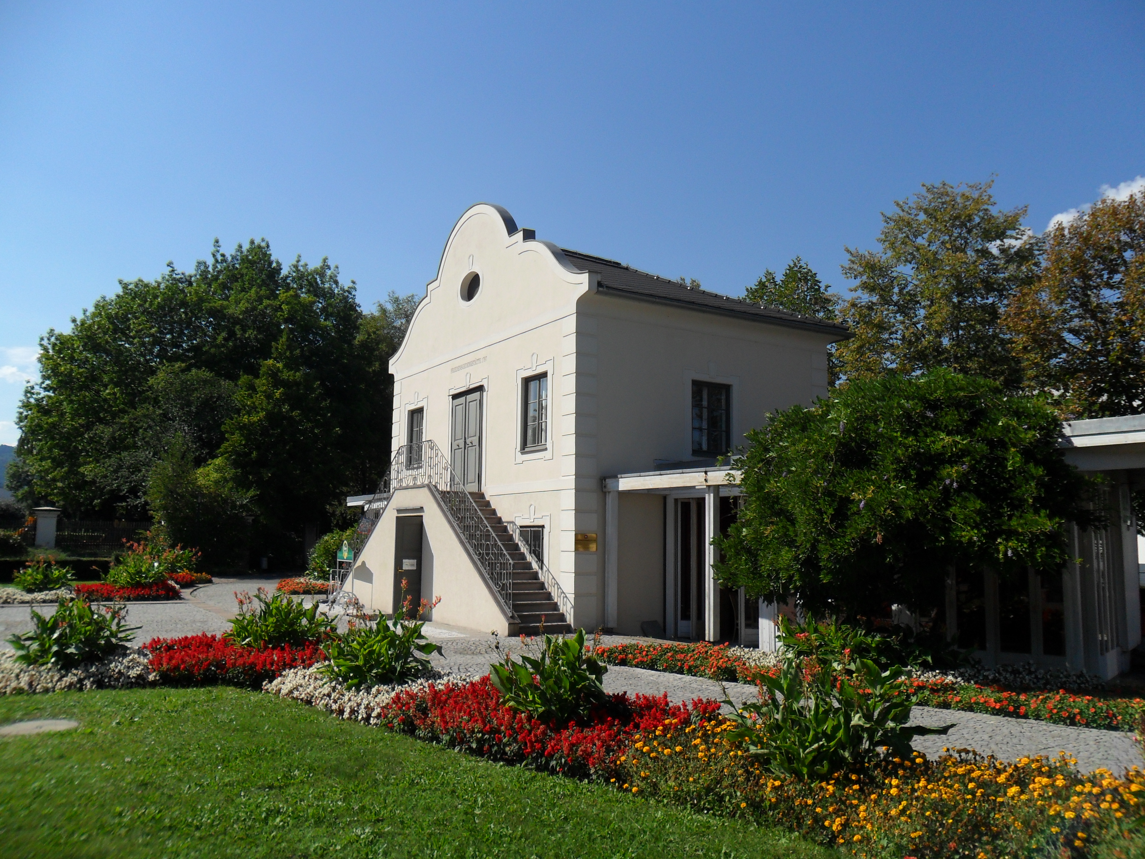 Eggenwaldsches Gartenhaus und Friedensdenkmal Mühltaler Straße 26 in Leoben